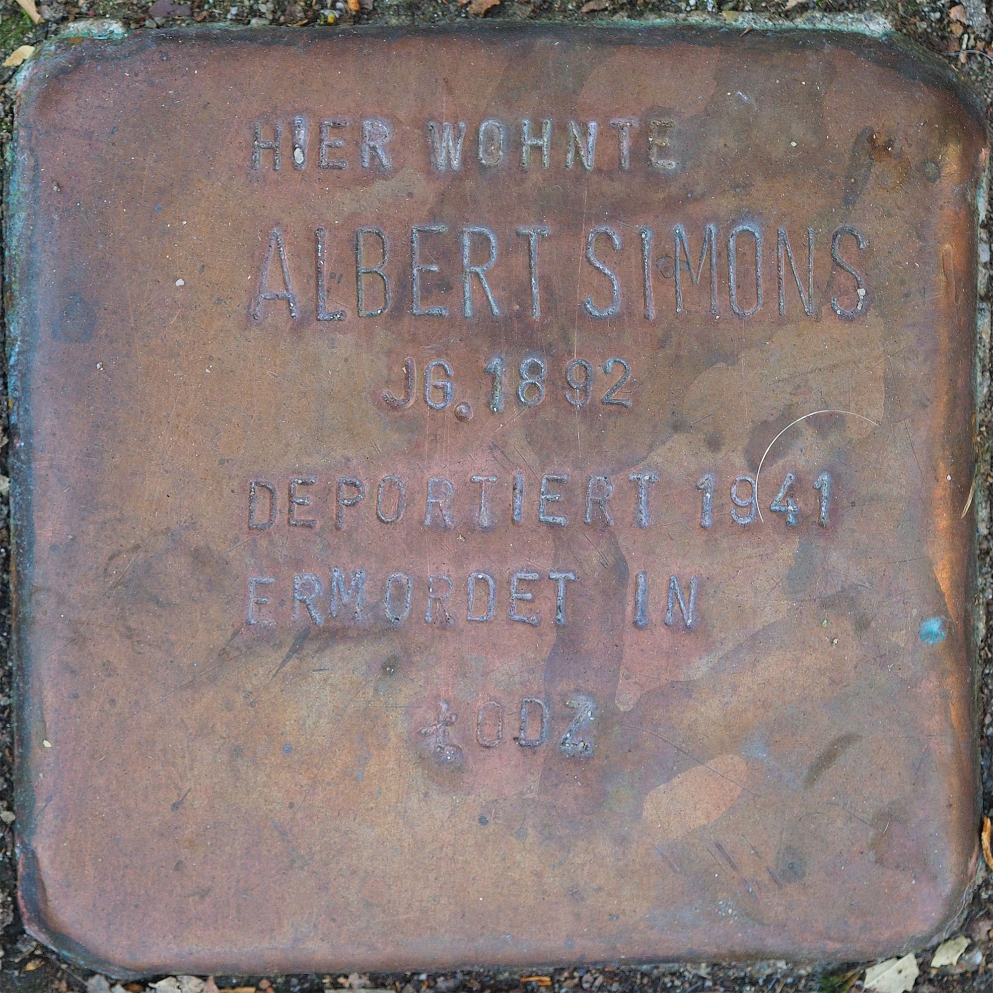 Stolperstein VIE: Simons, Albert